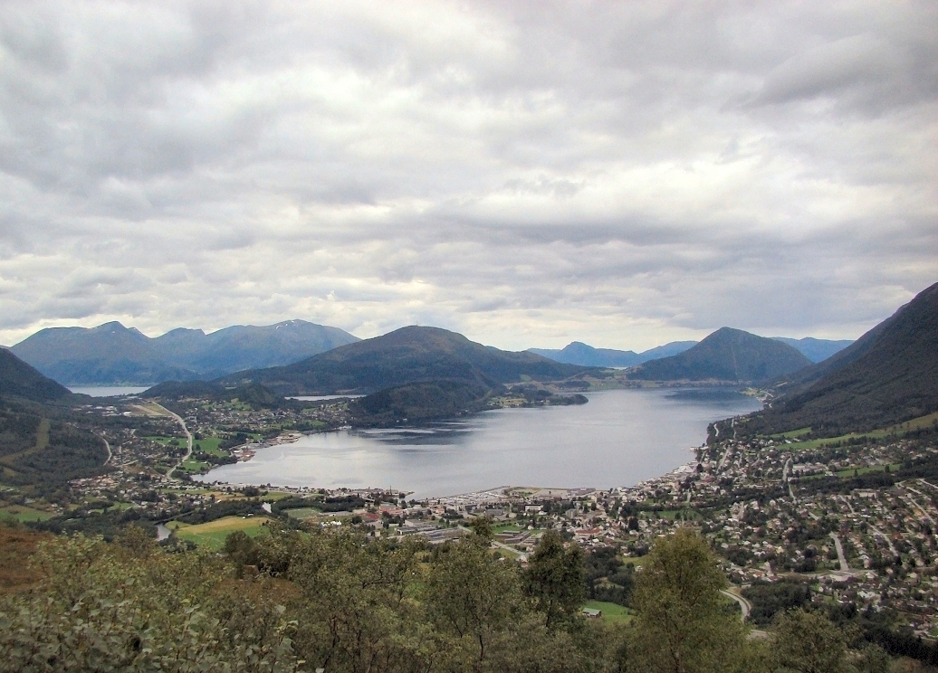 Utsikt frå Brekkeheida, mot Ørsta og Ørstafjorden (foto:2009)